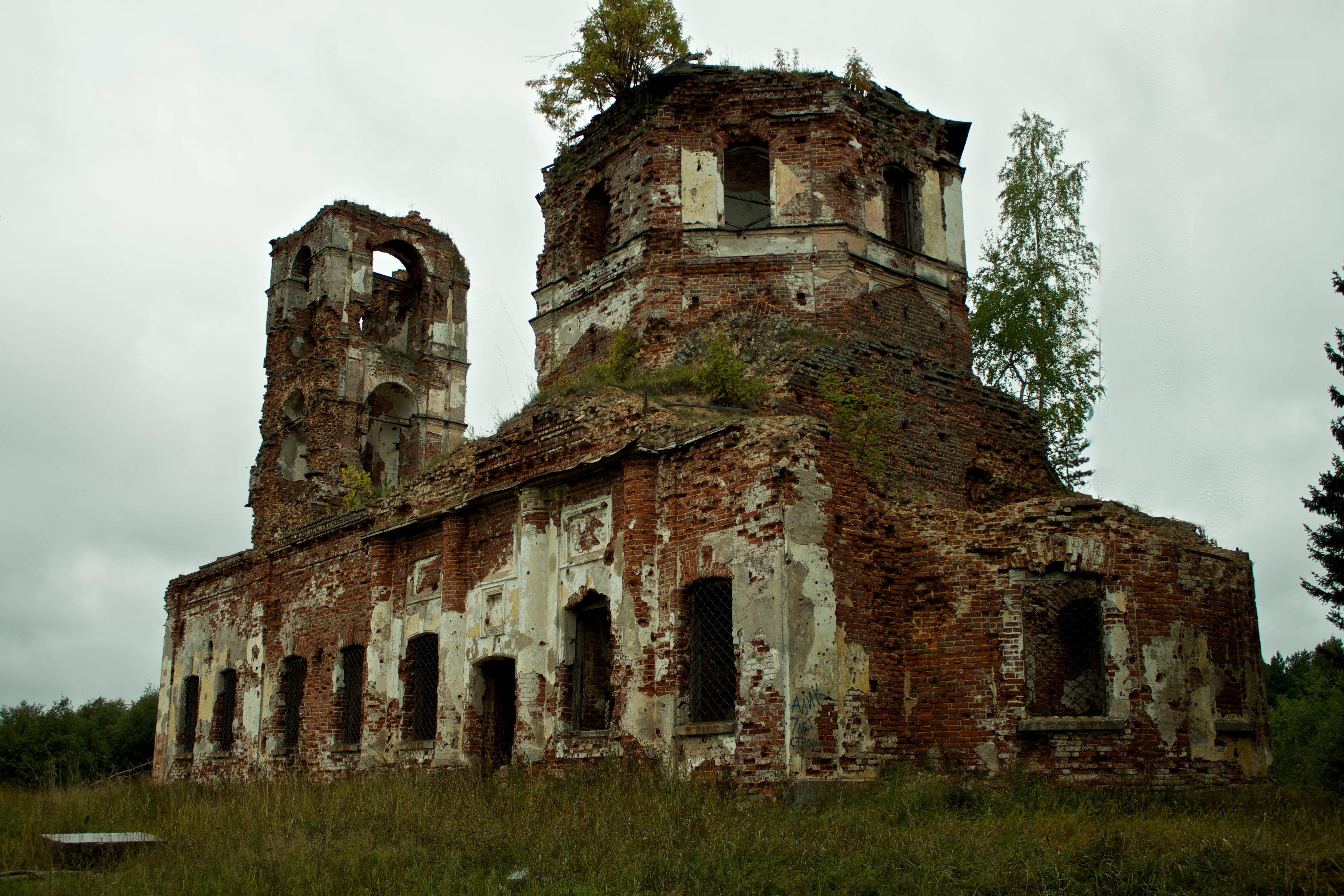 (Республика Карелия, Питкяранта, посёлок салми)